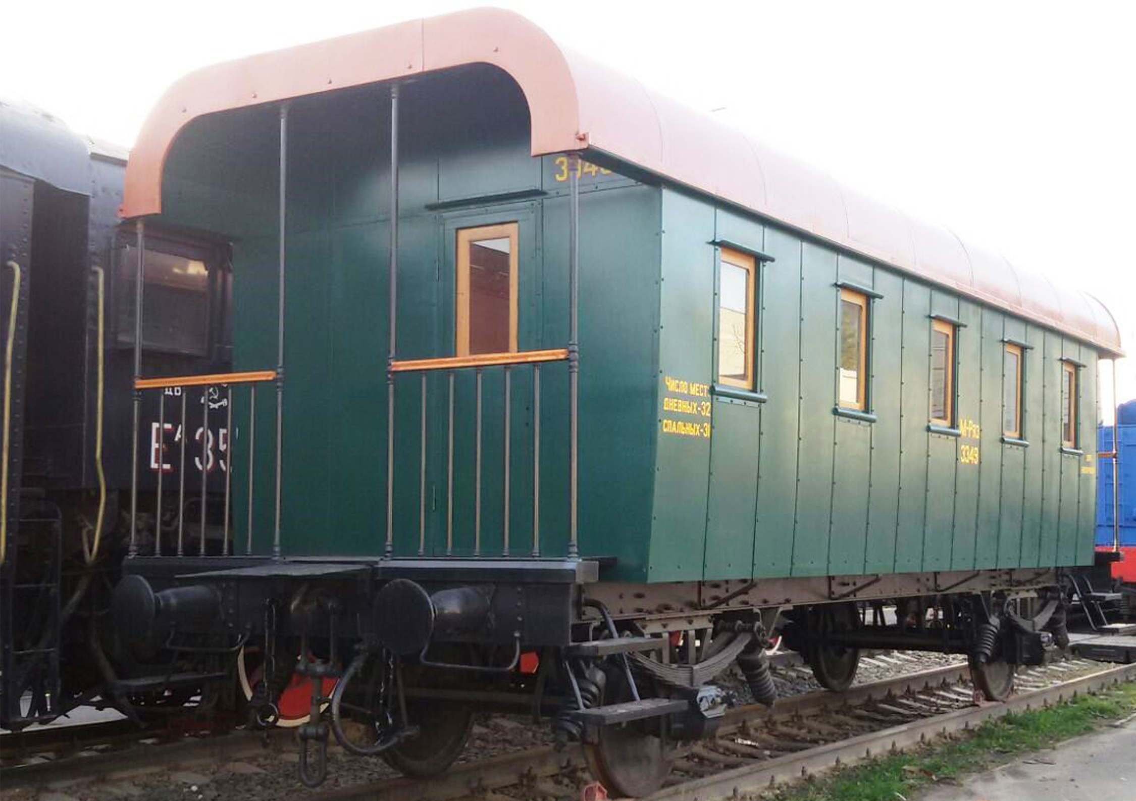 Вагон построен в 1869 году на заводе "ГЛОСТЕР", Англия